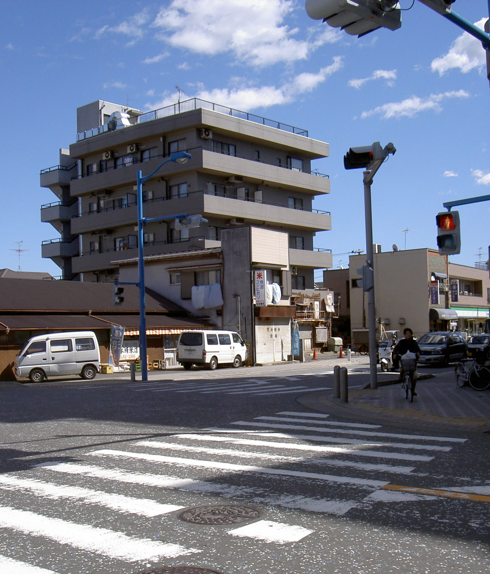 Kanagawa Prefectural Road Route 502 ja: 神奈川県道502号淵野辺停車場線